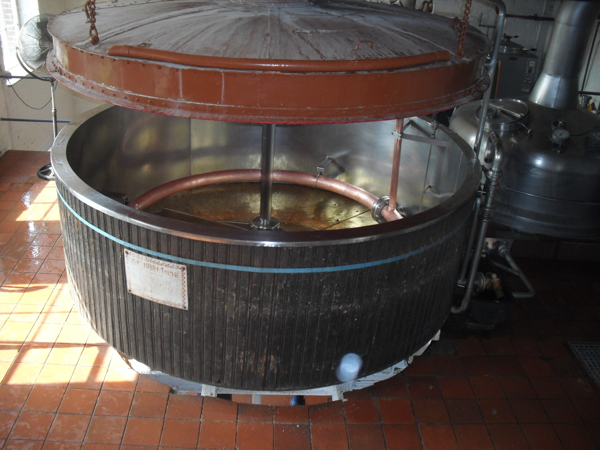 Brouwketel St Feuillien - Le Roeulx - Henegouwen - België